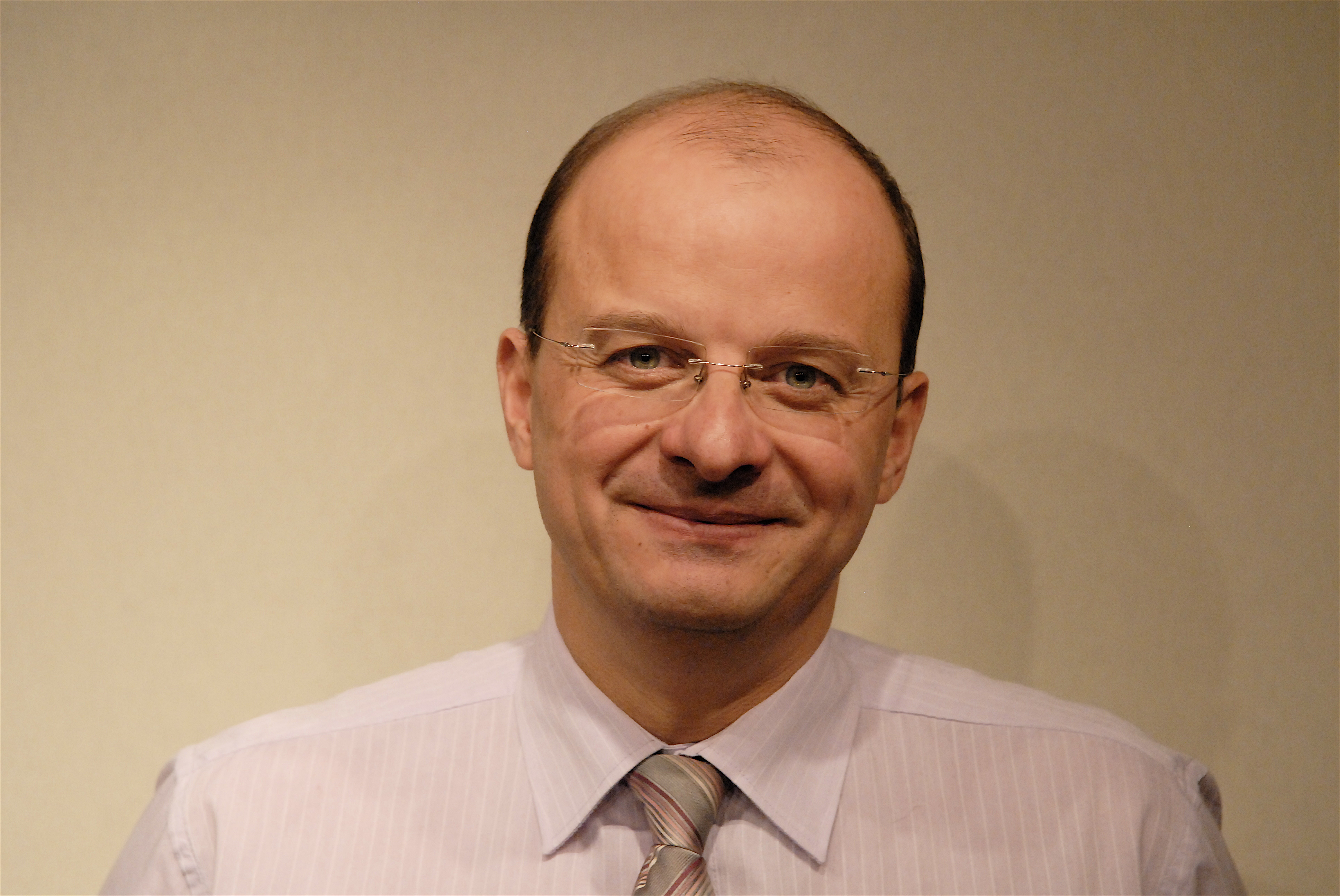 Christophe Grudler, tête de liste MoDem aux élections régionales de 2010 en Franche-Comté.